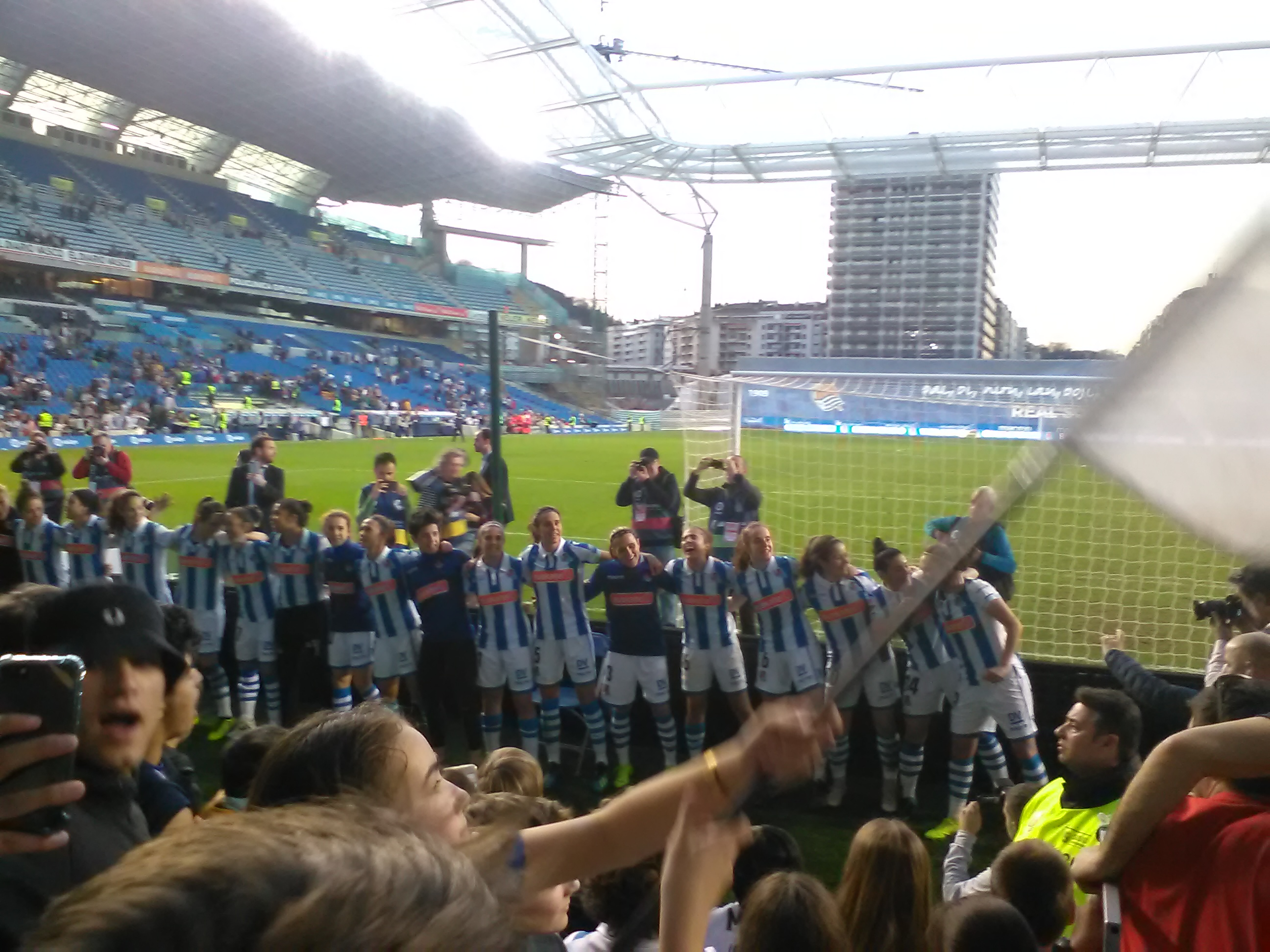 Equipo de la Real Sociedad de fútbol Femenino